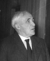 Title: William Wedgwood Benn, Lord Stansgate Factual corrections and alternative descriptions are encouraged separately from the original description. Additionally errors can be reported at this page to inform the Bundesarchiv. Original historic description: Zentralbild TBD-Wlocka Zi-Ku. 1235. A.-V. 27.9.1954 24.9.1954 7. Parteitag der CDU in Weimar - 21. bis 25.9.1954 Der 2. Verhandlungstag des CDU-Parteitages am Donnerstag, dem 23.9.1954, stand im Zeichen der Aussprachen. UBz: (von li. nach re.:) Lord Stansgate, Mitglied des Oberhauses und der Labour Party aus London, Herr Otto Nuschke und Herr Karlfranz Schmidt-Wittmack, ehemaliger CDU-Bundestagsabgeordneter, der um politisches Asyl in der DDR ersuchte, im Gespräch.